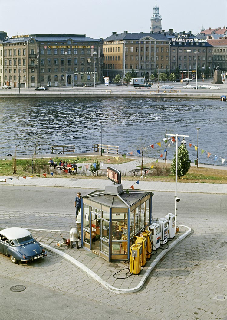 Bensinmacken vid Sjöbergsplan, Slussen, Stockholm.